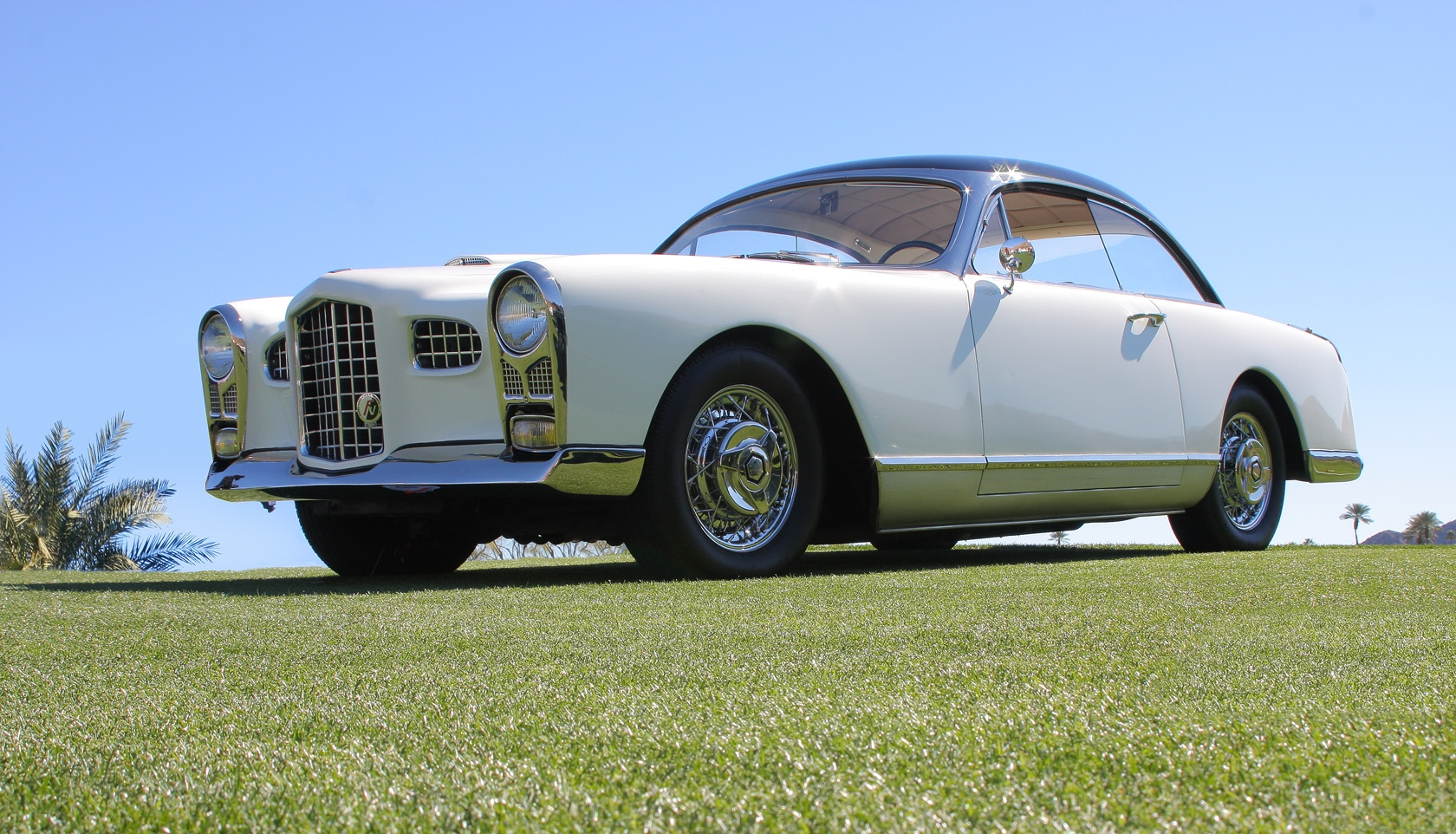 2011 Desert Classic, La Quinta, CA